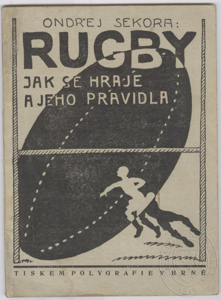 Ilustrace Ondřeje Sekory ze sbírek Národního muzea. Podsbírka: Sbírka tělesné výchovy a sportu, fond: Archiv tělesné výchovy a sportu, skupina: Z Archivu tělesné výchovy a sportu.